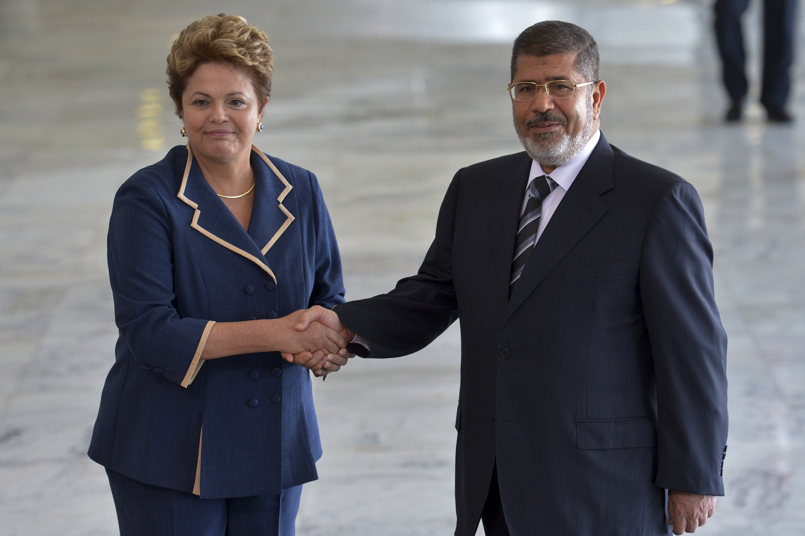 A presidenta Dilma Rousseff recebe, no Palácio do Planalto, o presidente egípcio, Mouhamed Mursi.